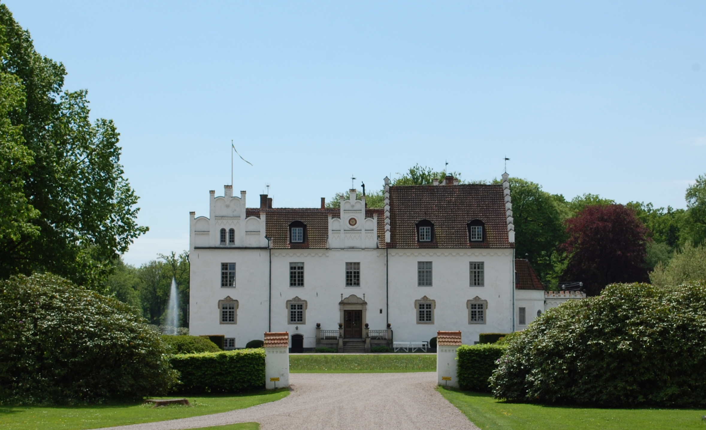 Schloss Wanas